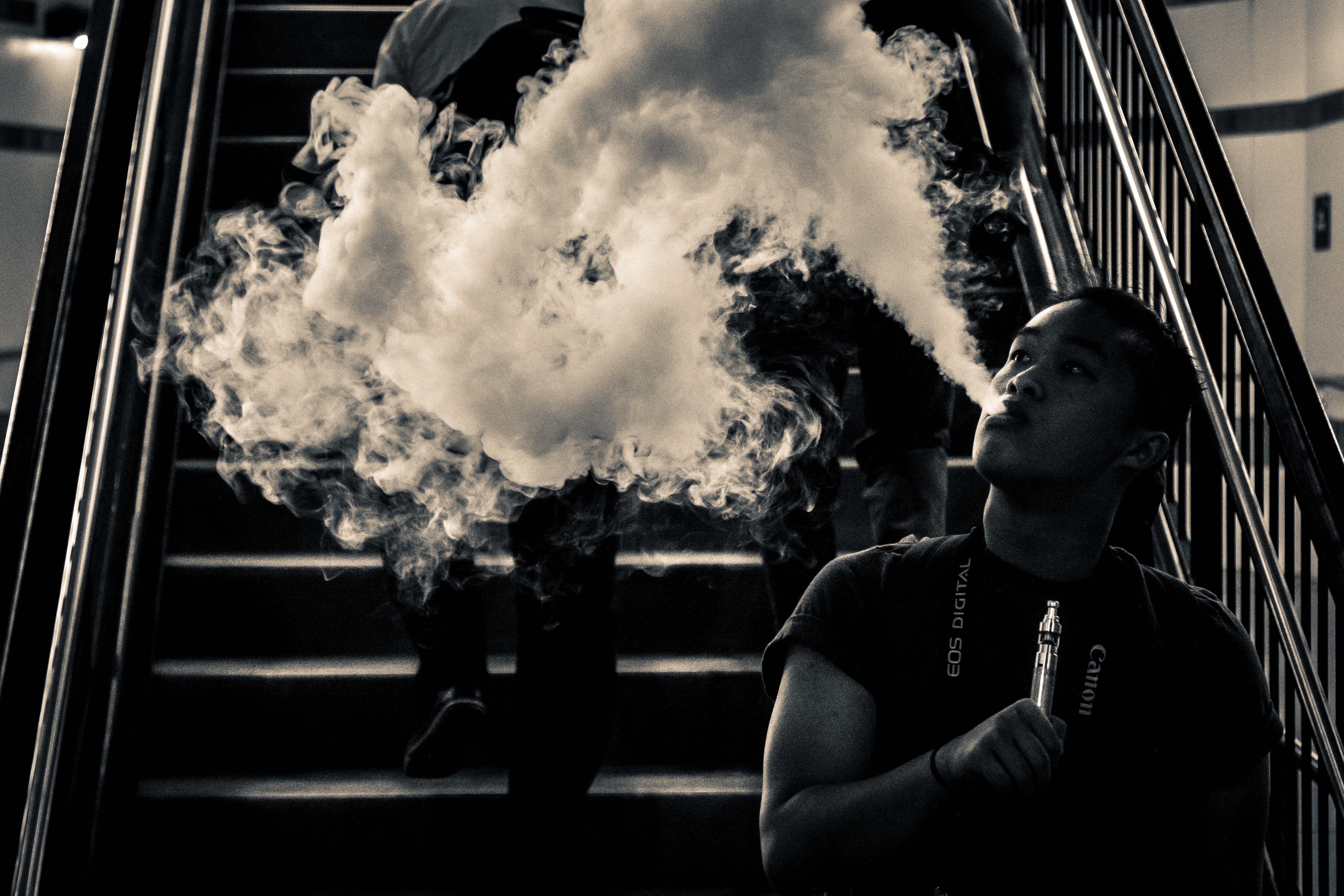 Smoke Screen